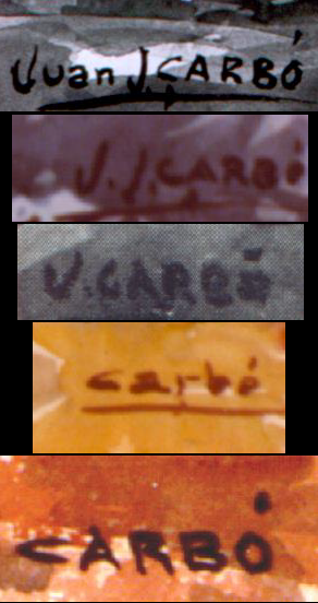 CARBÓ. Evolució de les signatures